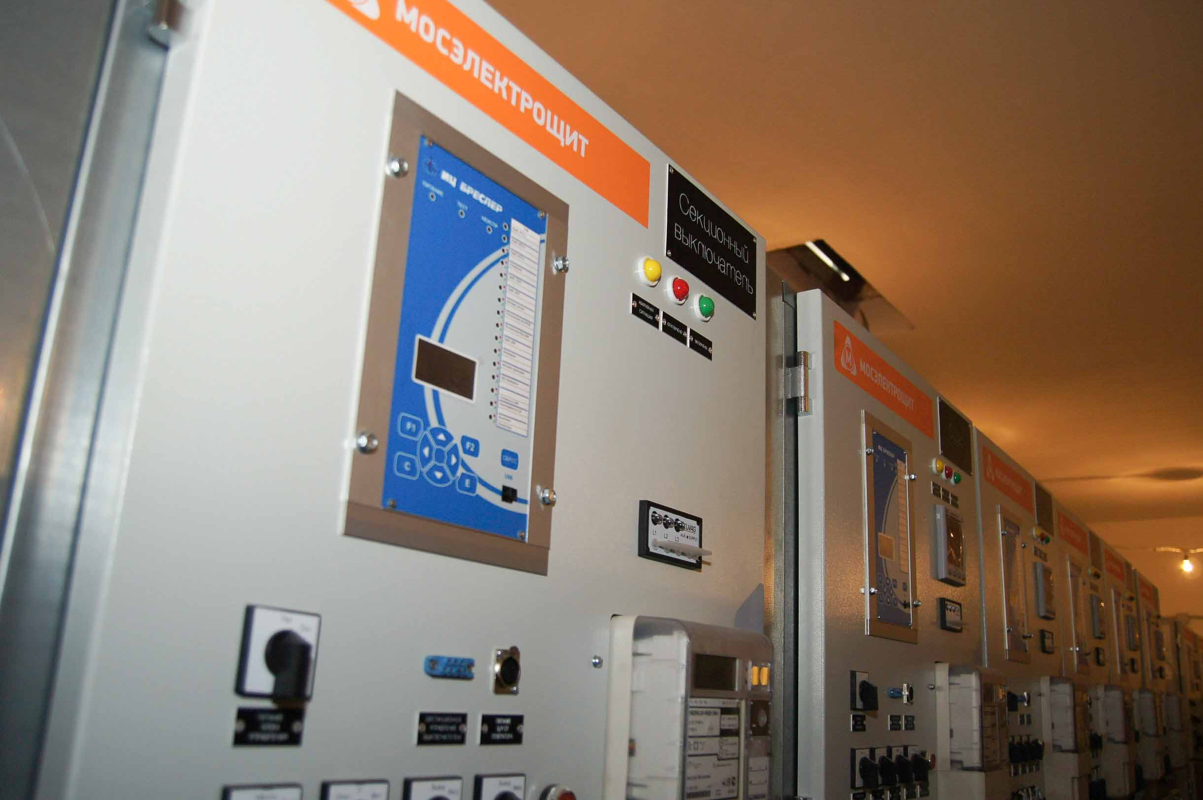 К-129 ОПТИМА на 6(10) кВ